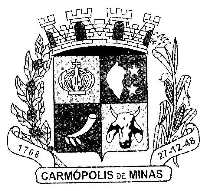 Brasão de Carmópolis de Minas.